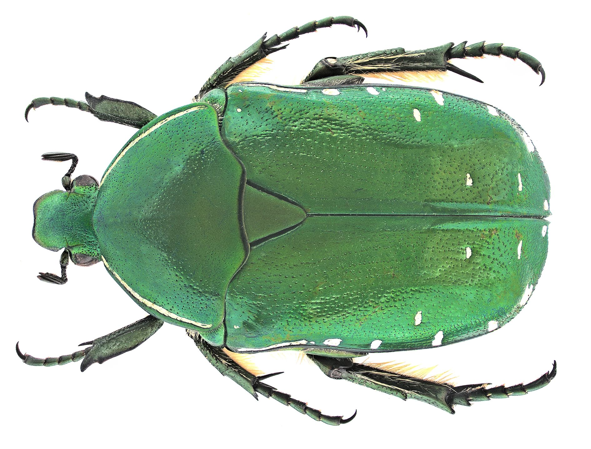 Familie: Scarabaeidae Grösse: 24 mm Verbreitung: Kenia, Südafrika Fundort: Malawi, Blantyre leg. 1974 Foto: U.Schmidt, 2007